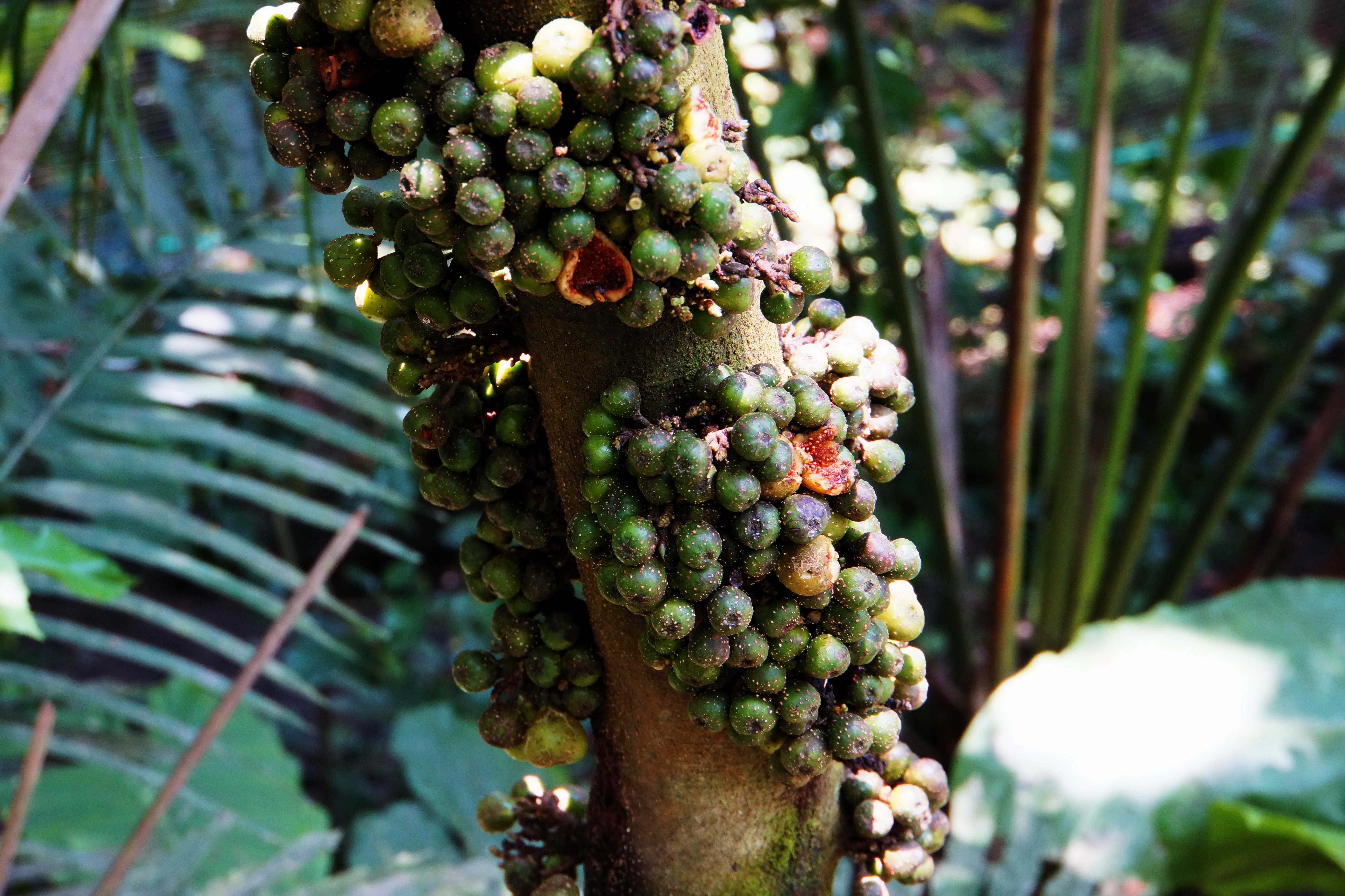 水同木 Milk Tree (Ficus fistulosa Reinw. ex Blume.)